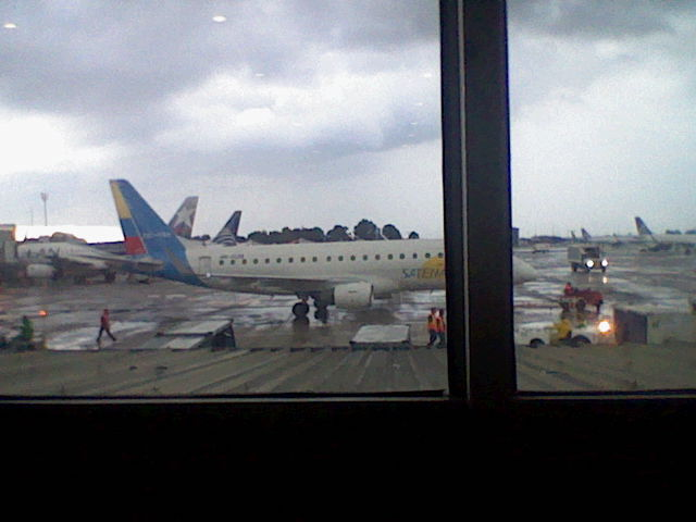 ERJ-170 En ElDorado